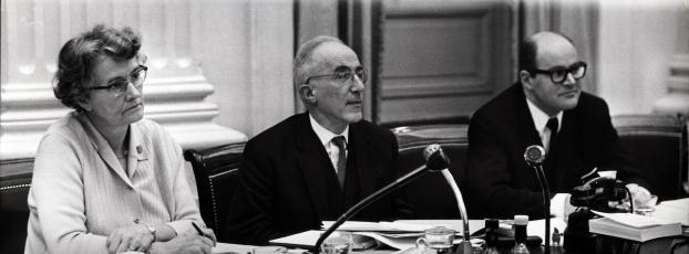 Minister Klompé, Minister Polak en staatssecretaris Grapperhaus aan de regeringstafel tijdens de behandeling van de Staatsloterij en voetbaltoto in de Tweede Kamer. Nederland, 9 april 1968.